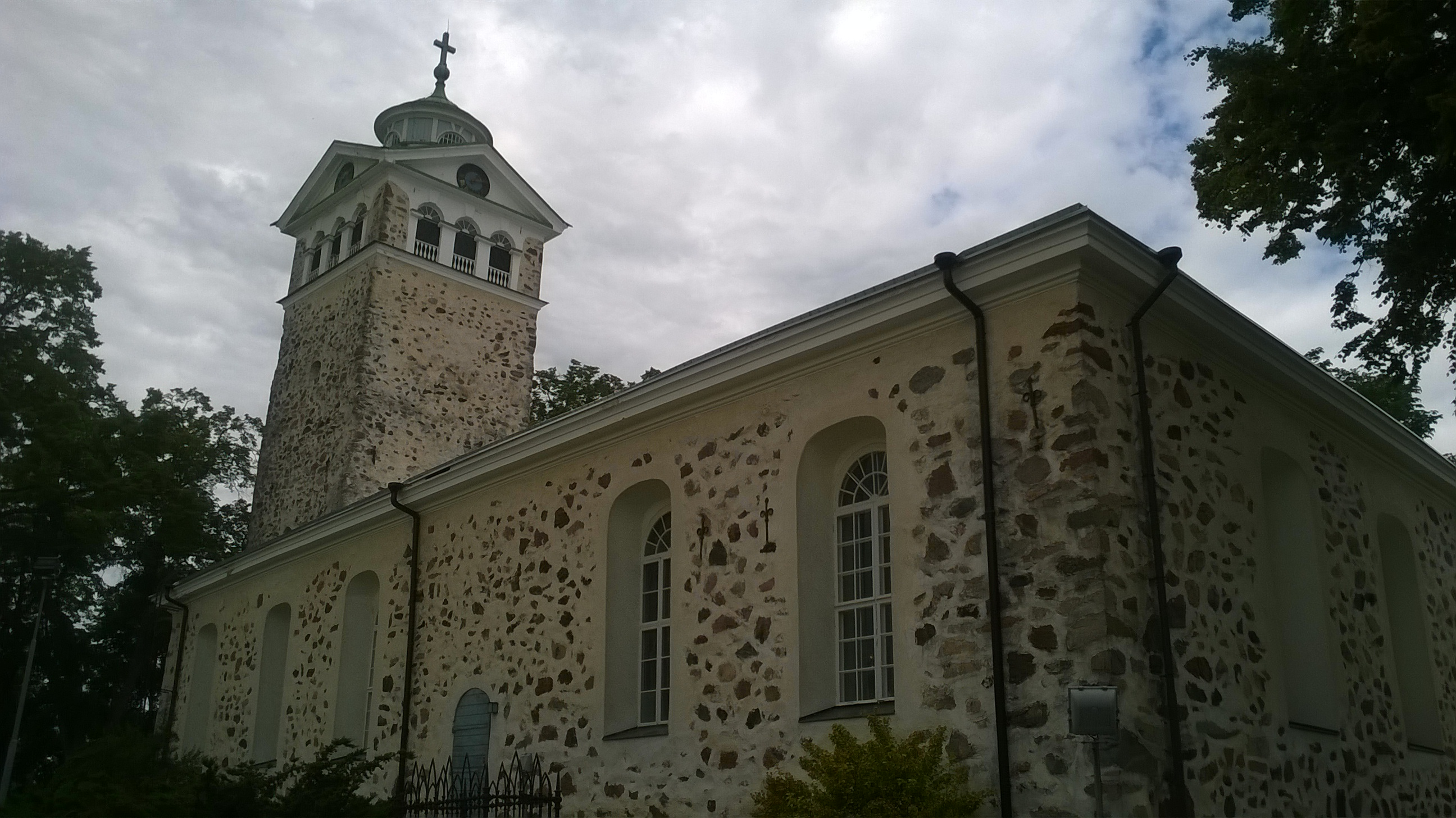 Tammisaaren kirkko; kirkkorakennus Raaseporin Tammisaaressa